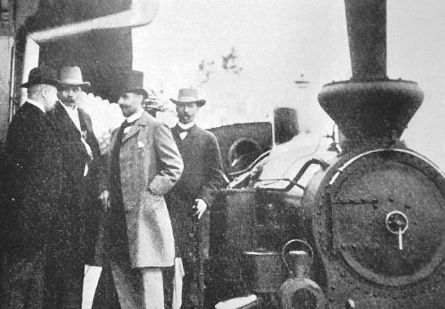 Från Saltsjöbanans invigning 1 juli 1893